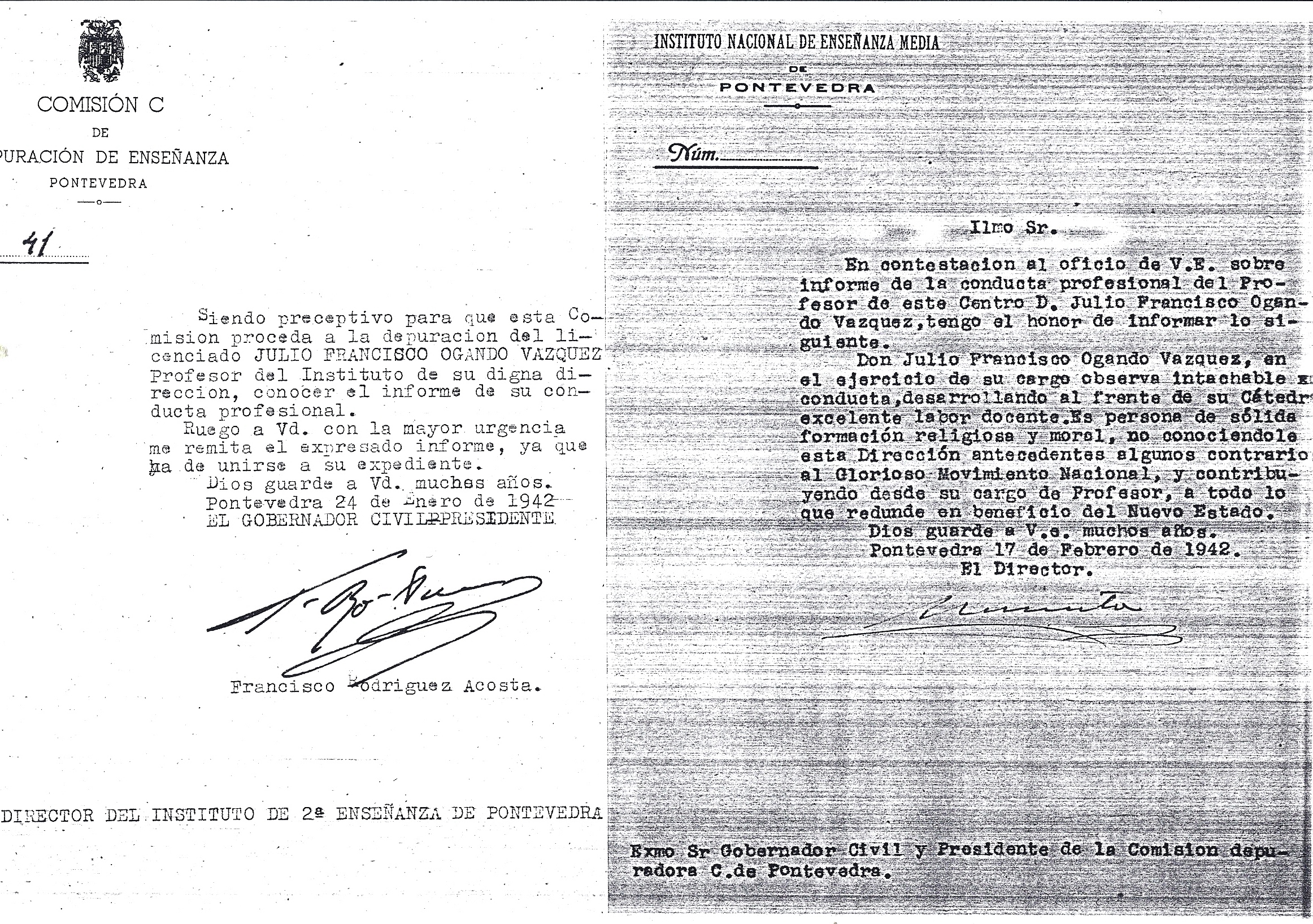 Petición de informe da Comisión de Depuración e resposta do Instituto